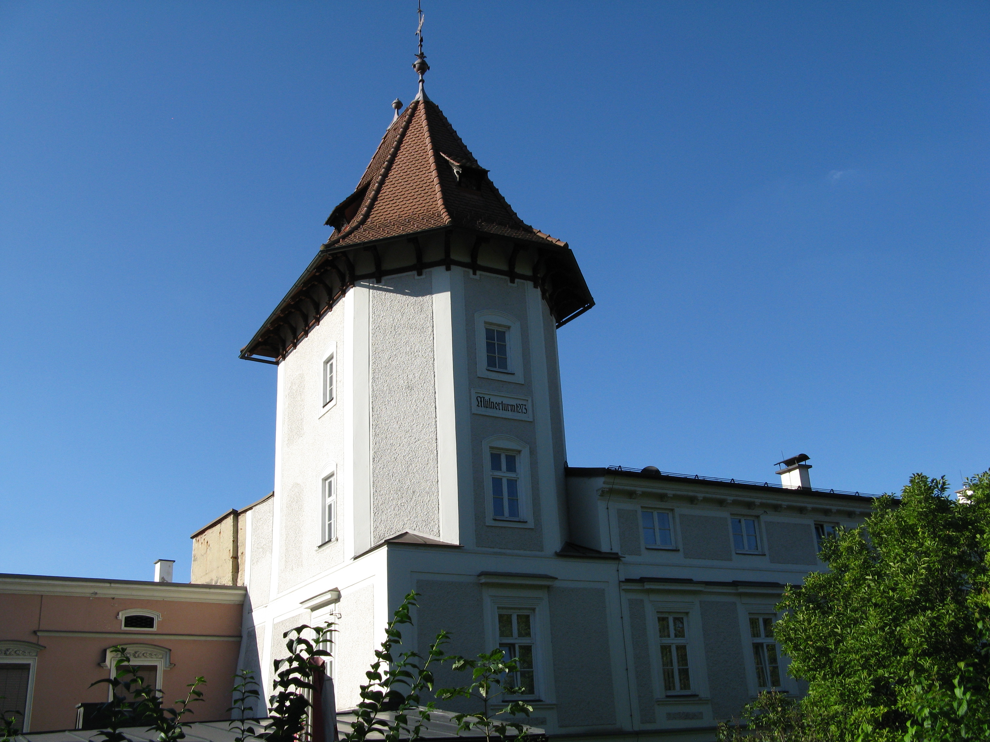 Müllner-Turm